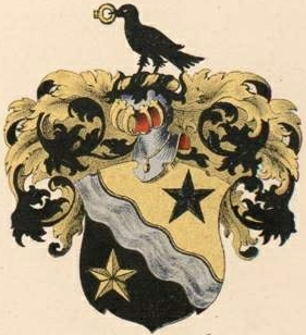 Bellingshauseni suguvõsa aadlivapp